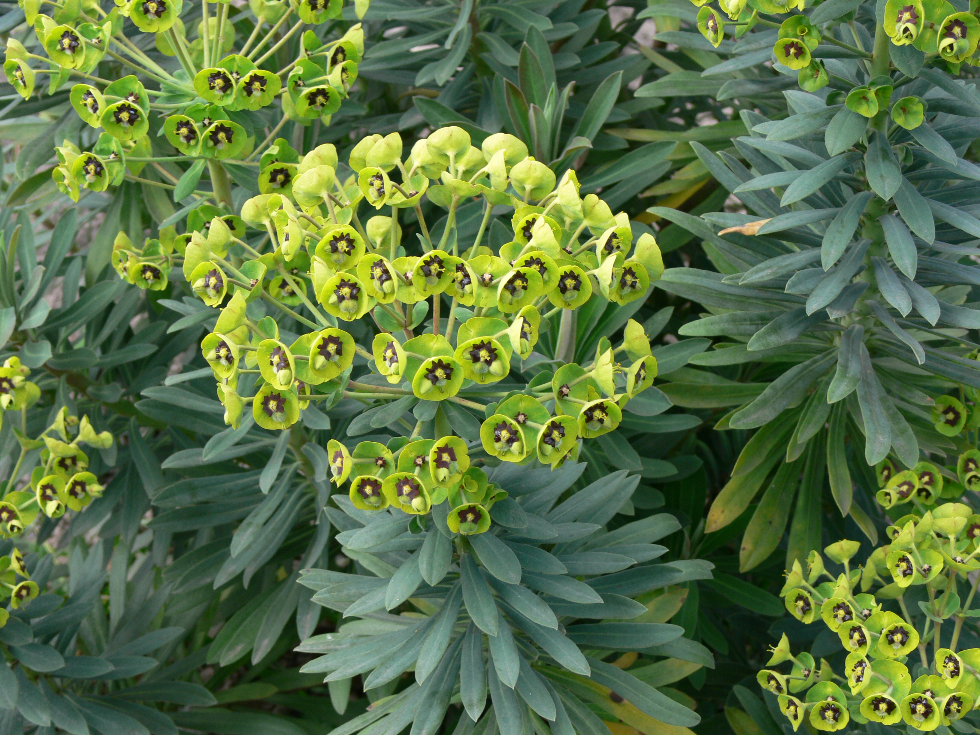 Euphorbia dulcis L. süße Wolfsmilch, Botanischer Garten Krefeld